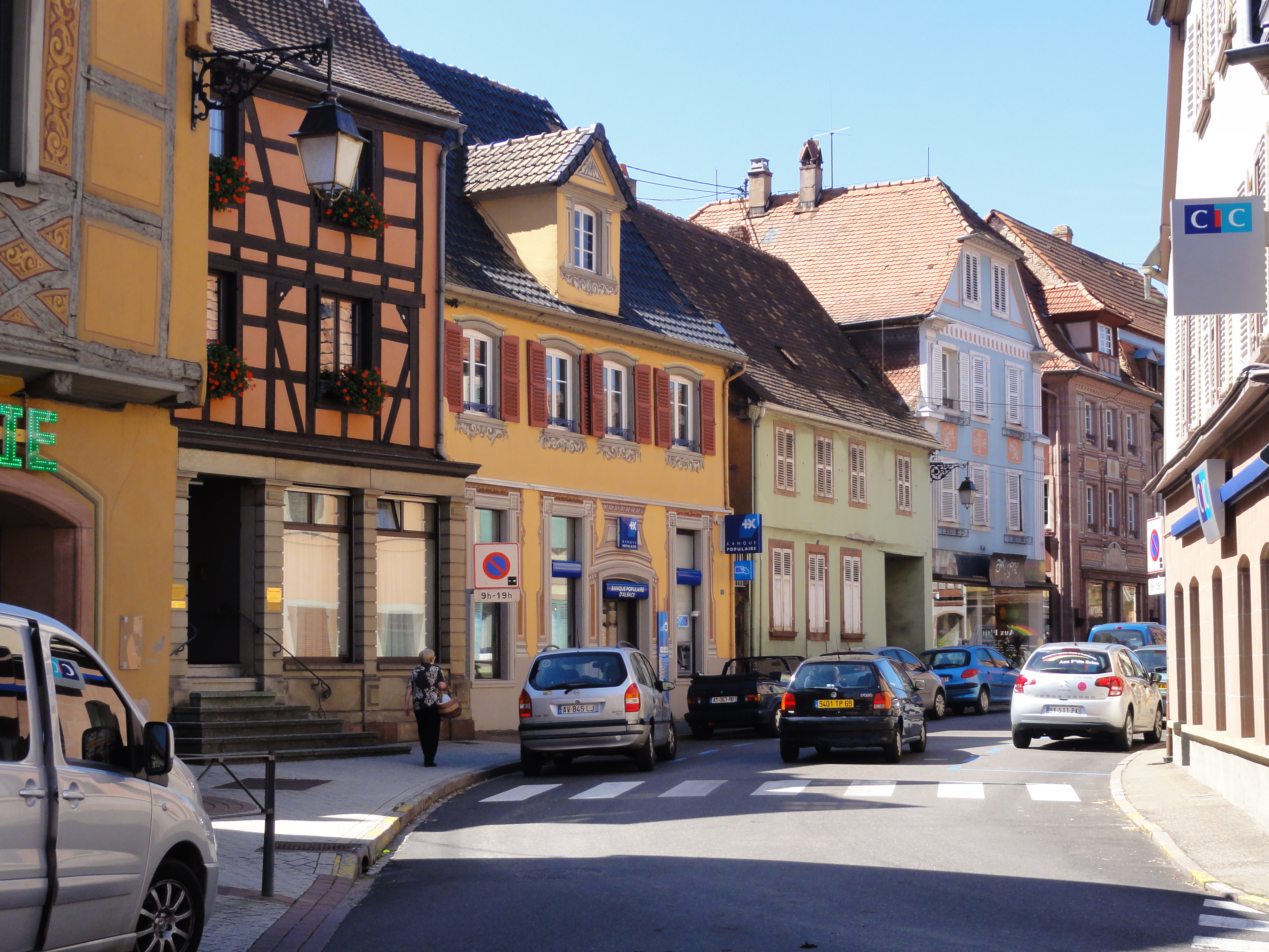 Alsace, Bas-Rhin, Pfaffenhoffen, Rue du Docteur Schweitzer.